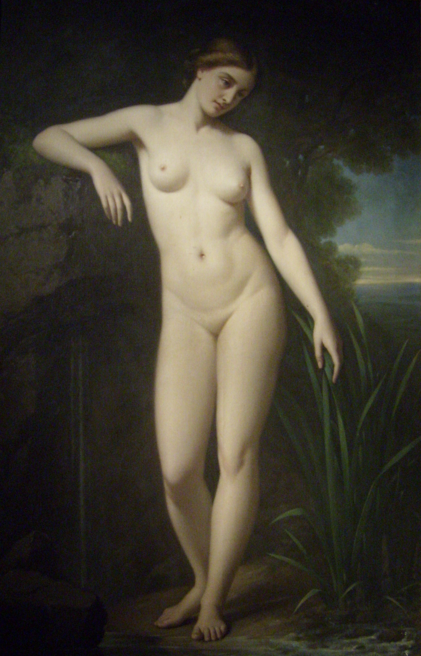 Aréthuse